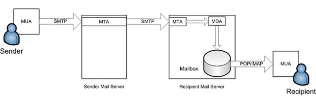 Монгол: mail server block diagramm